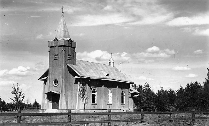 Кирха в Калливиере